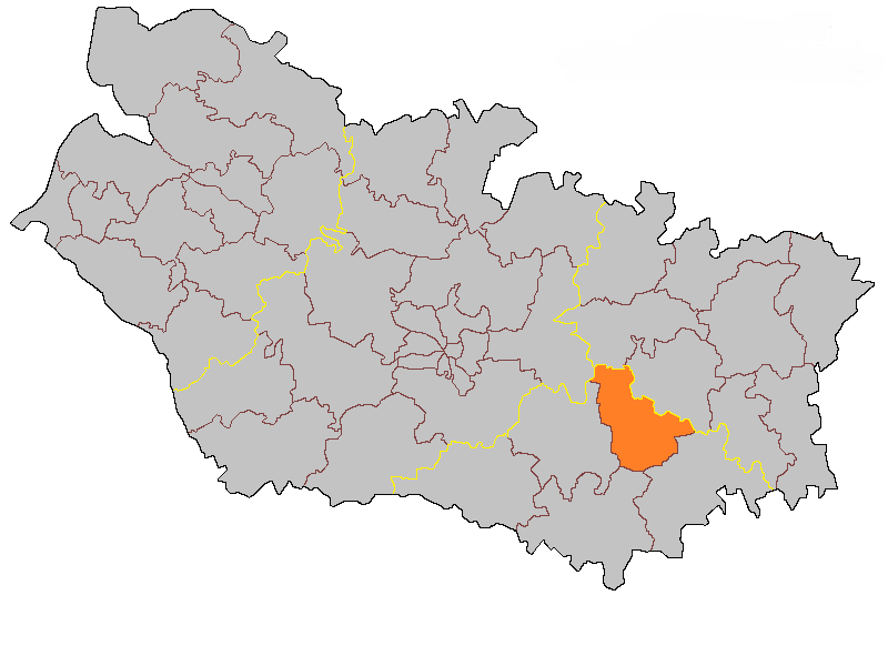 Кантон Розьер-ан-Сантерр на карте департамента Сомма